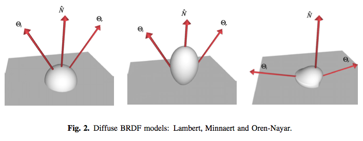 Diffuse BRDF model